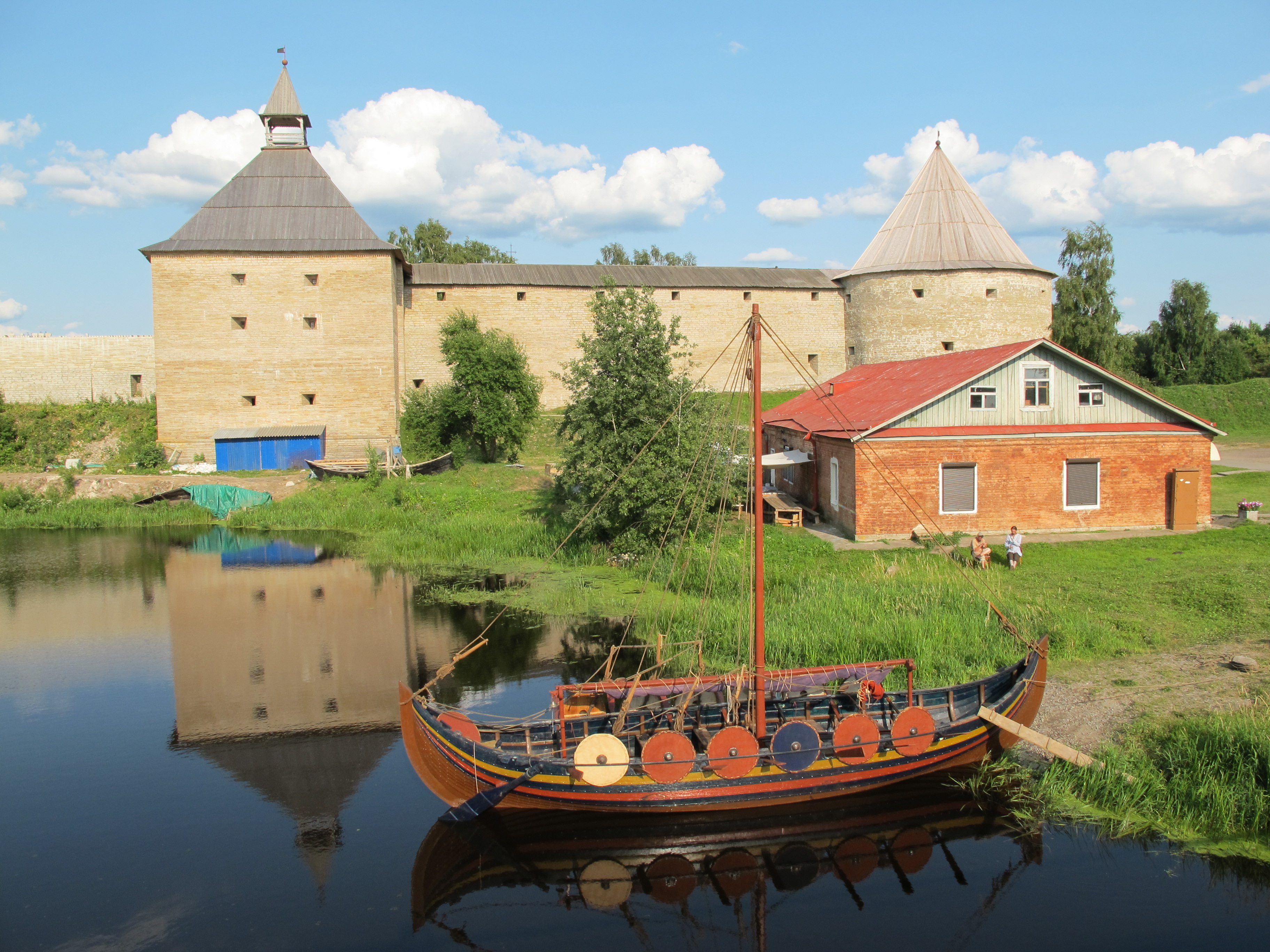 Крепость «Старая Ладога» (Санкт-Петербург и Лен.область, Новая Ладога, село Старая Ладога)